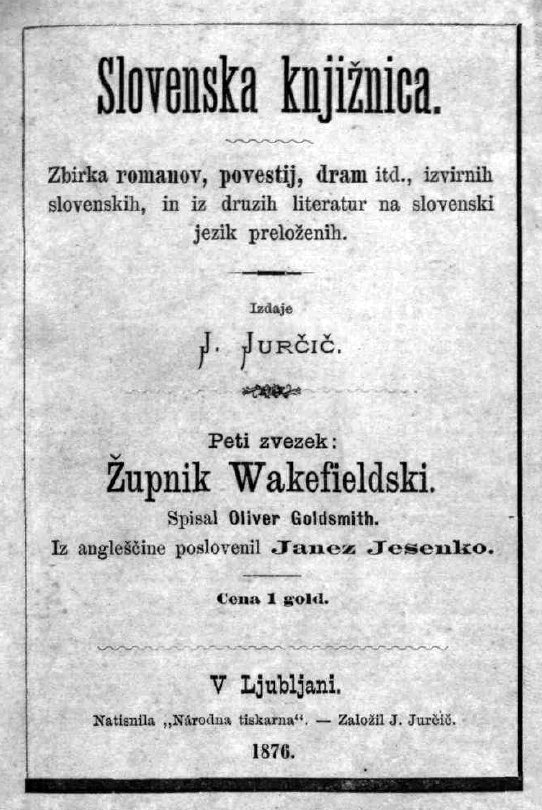 Naslovnica prvega natisa romana Župnik Wakefieldski